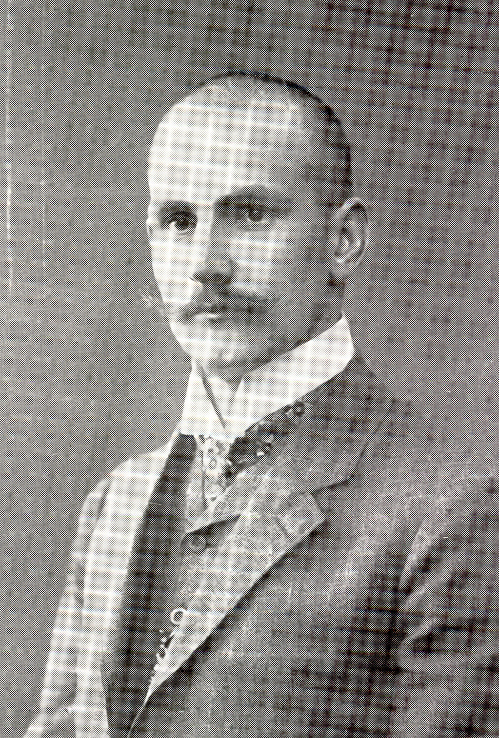 Peeter Põld (1878–1930)